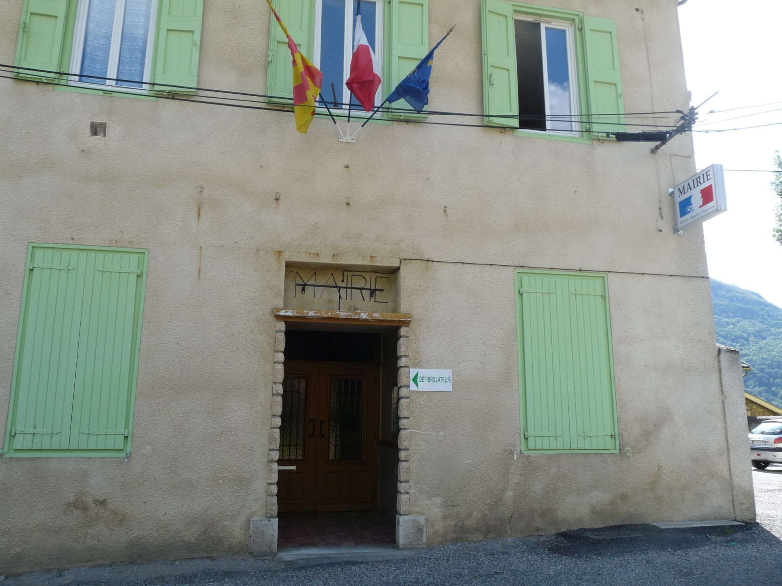 Mairie de Verdun, Ariège, France